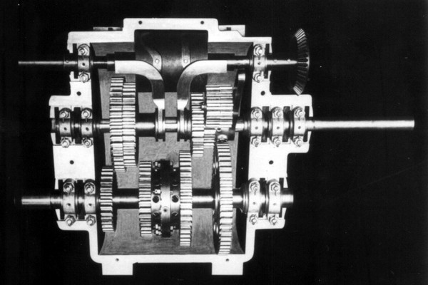 Boite à vitesse sous carter étanche Audibert et Lavirotte.